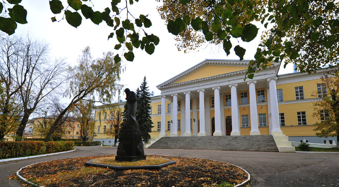 Здание Мариинской больницы в Москве 1806 года, в правом флигеле которого находится музей-квартира Фёдора Достоевского